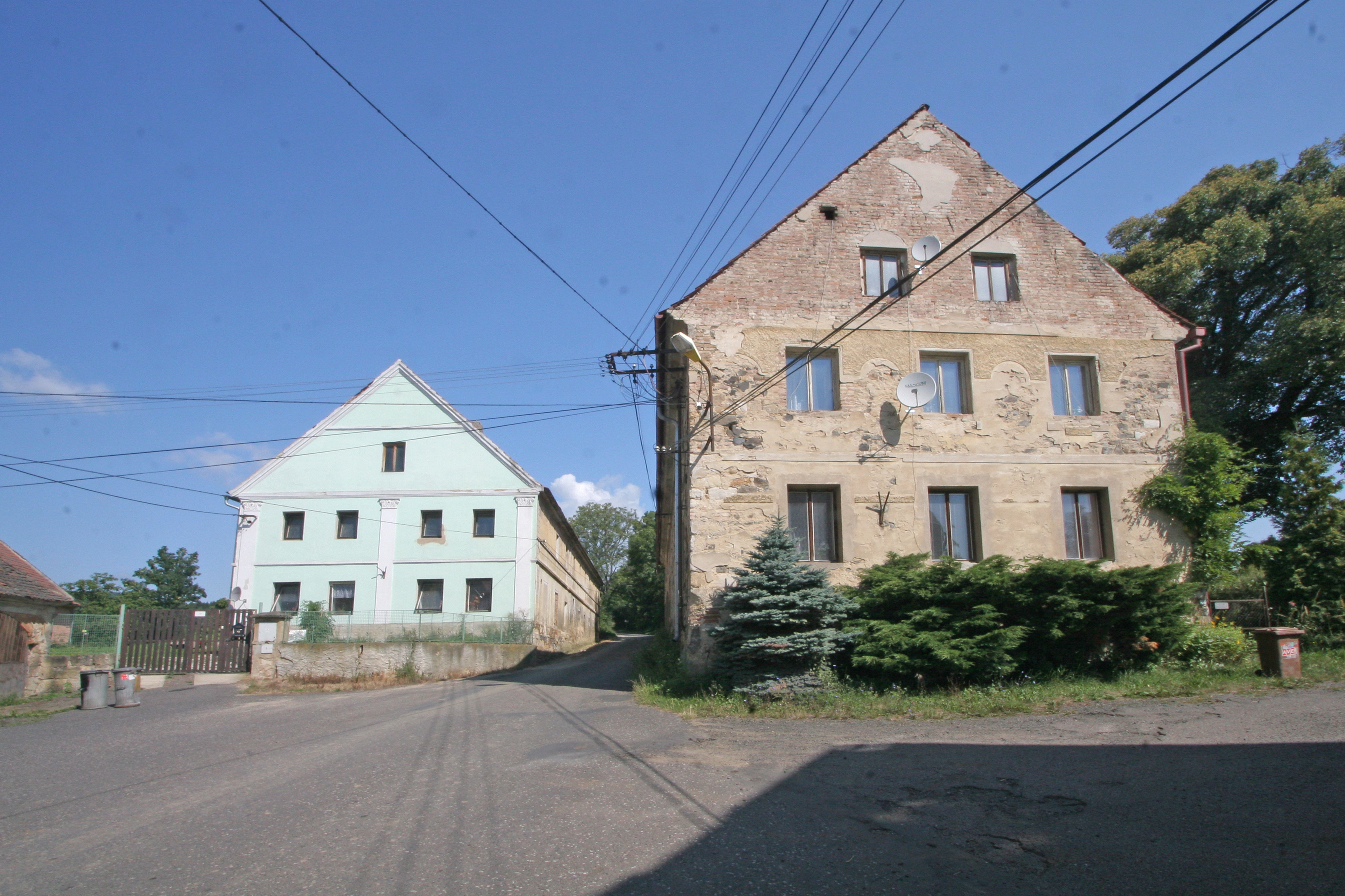 Držovice čp. 17